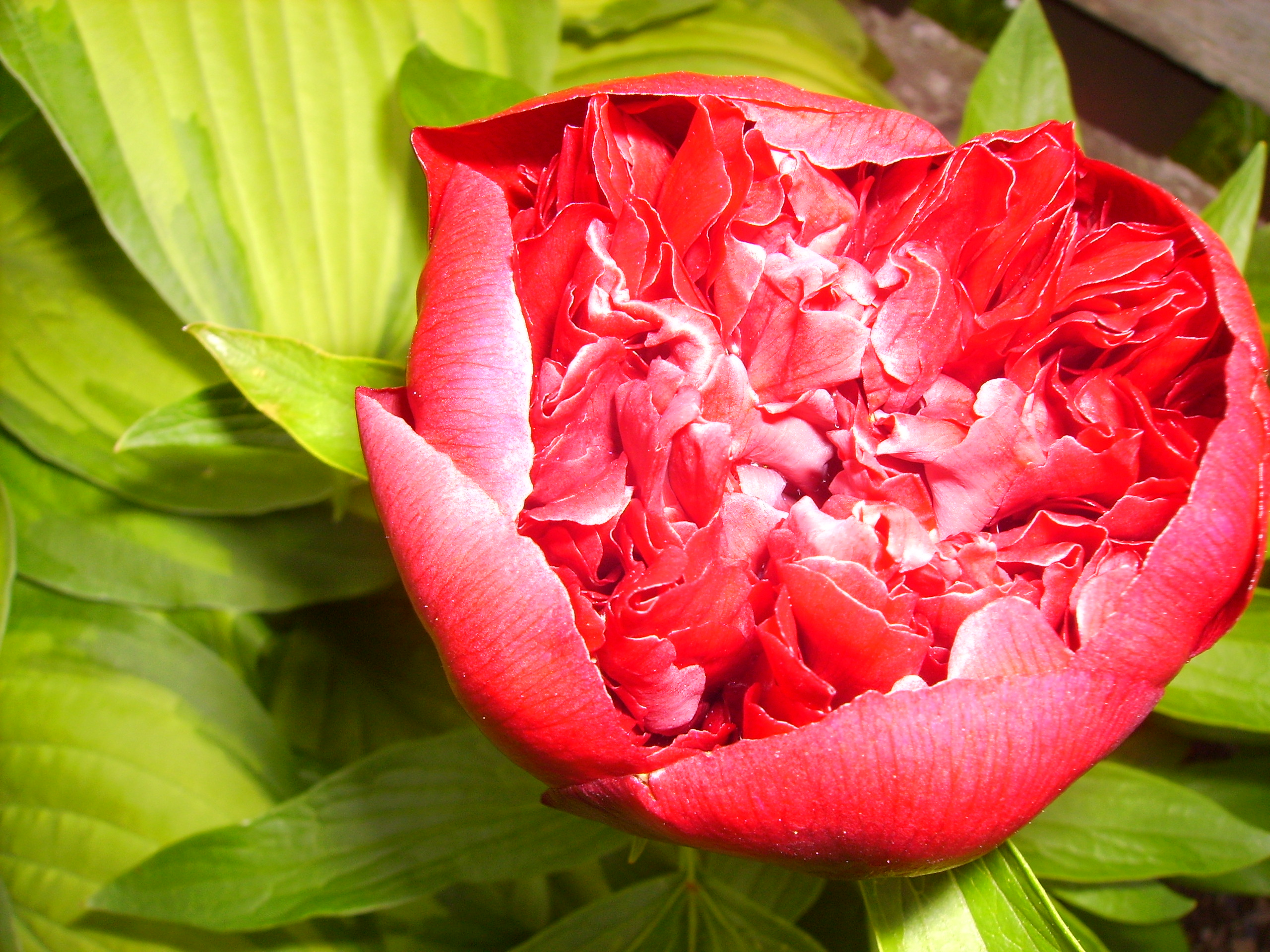 pivonka Paeonia × festiva 'Rubra Plena'